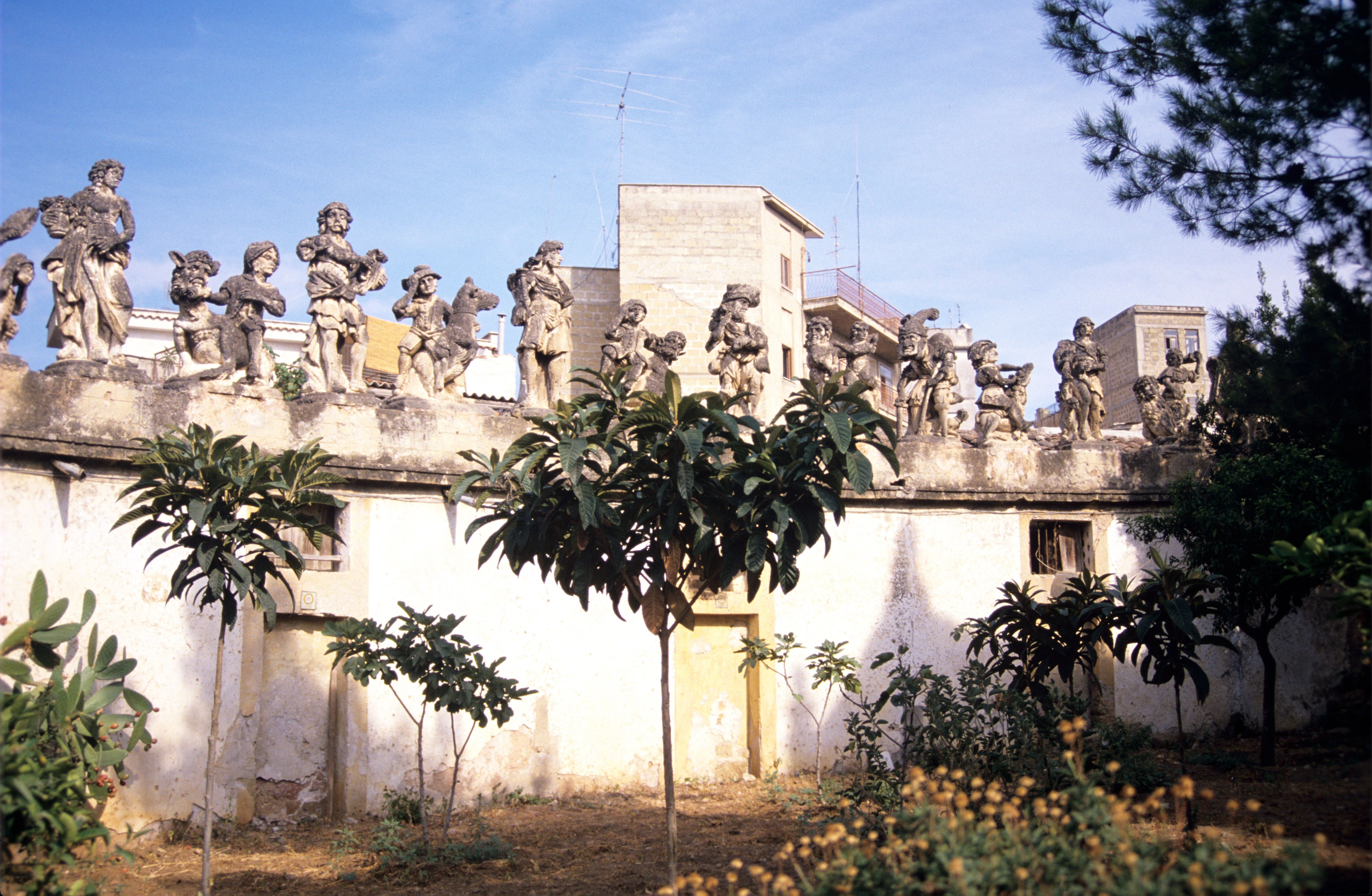 Villa Palagonia: mur d' enceinte de la villa avec statues. Bagheria, Sicile, Italie.